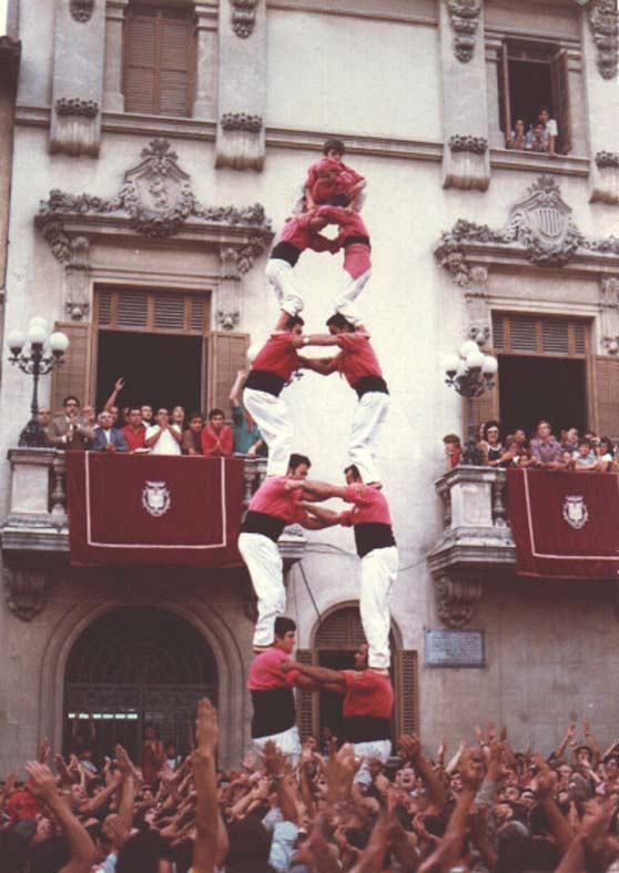 Primer 2 de 7 carregat per la CJXV, Sant Fèlix, 30-VIII-1971. Foto peta per; J. Suau.